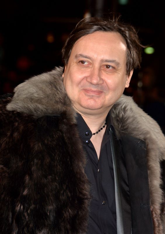 Michel Fau à la cérémonie des César